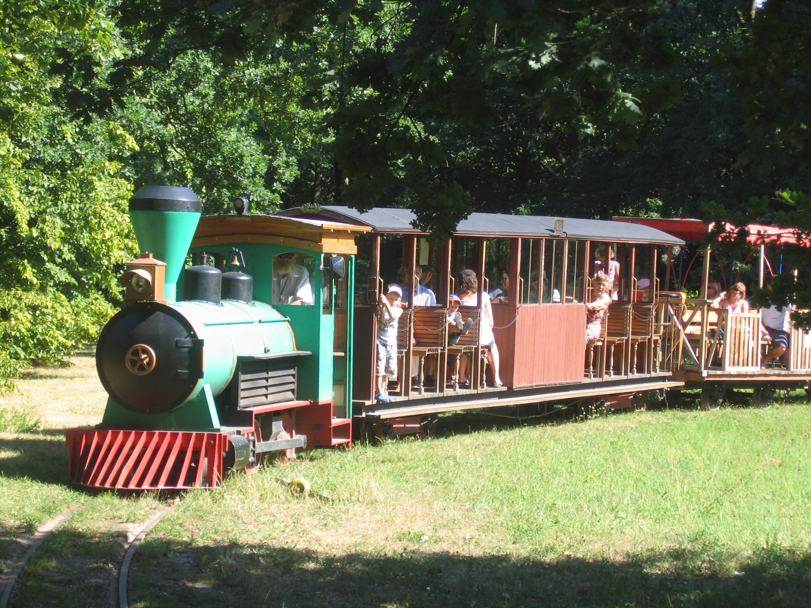 Museumseisenbahn Britz